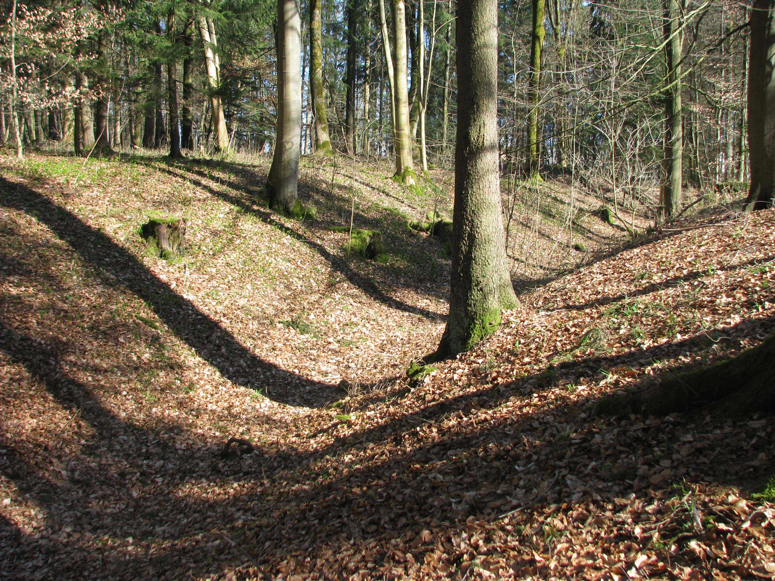 Rothenfels, Ortsteil von Deining im Landkreis Neumarkt in der Oberpfalz, Bayern, Burgstall